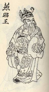 燕昭王於明朝小說《前七國志》登場的插圖